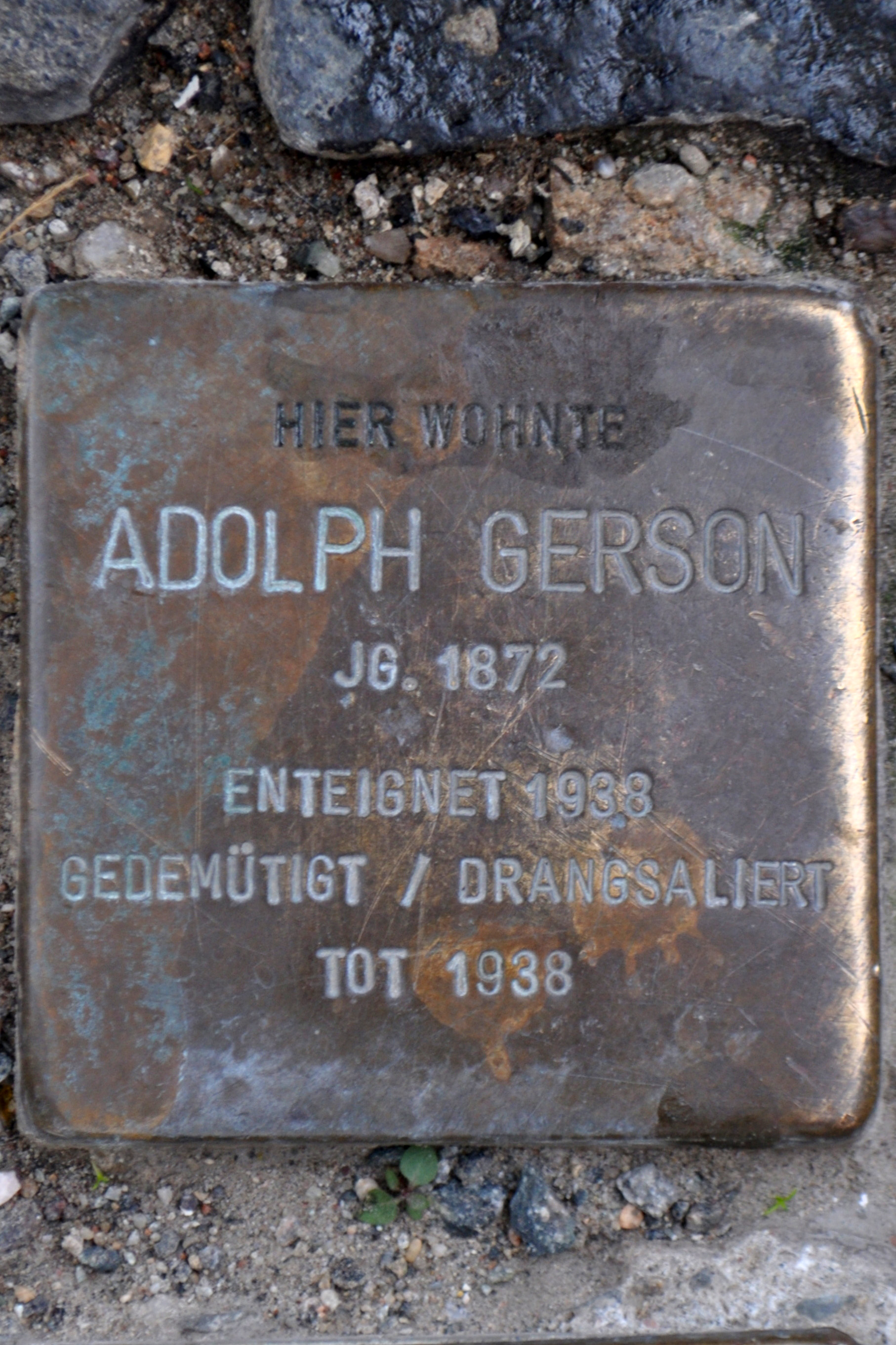 Stolperstein in Stralsund, Tribseer Straße. Der Stein ist einer von drei Stolpersteinen an diesem Ort. Text: Hier wohnte Adolph Gerson Jg. 1872 enteignet 1938 gedemütigt / drangsaliert tot 1938